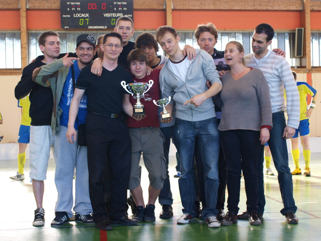 Les Nordiques Floorball Club champions de France D2.